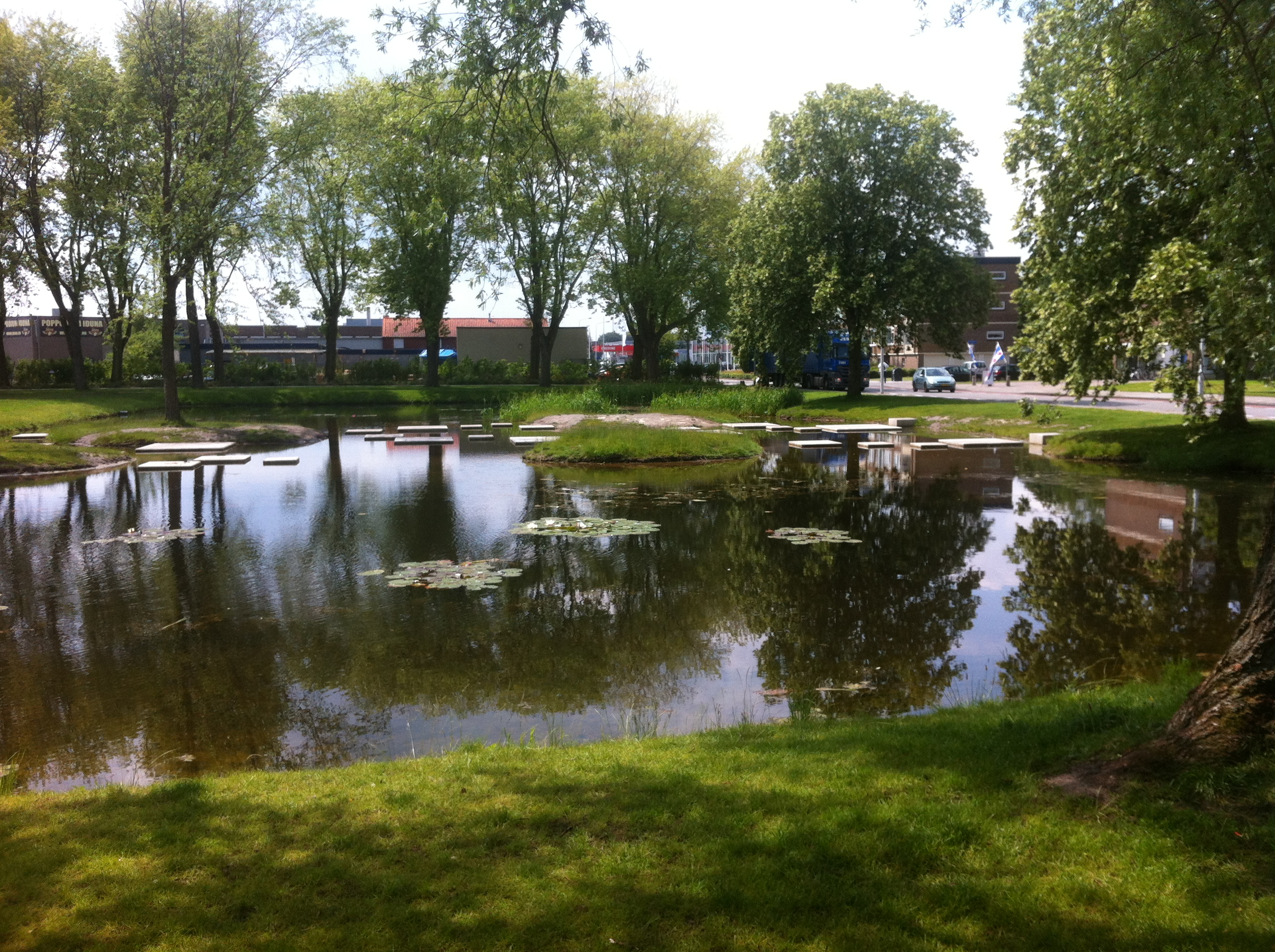 Het Thalenpark in Drachten Its number in the list of 89 proposed monuments is: 2013-02 For more information see Dutch Wikipedia: 89 topmonumenten uit de periode 1959-1965